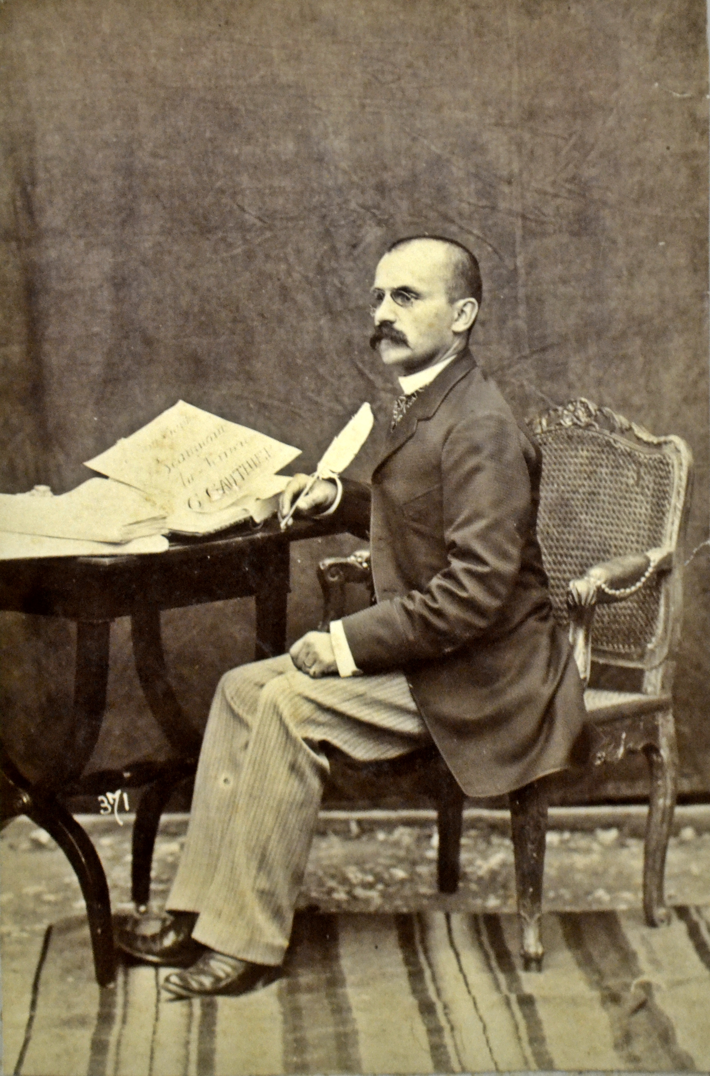 Gaston Gauthier (1860-1911), érudit nivernais ; Archives départementales de la Nièvre - Cote : 82 J 2467 ; dépôt de la Société académique du Nivernais